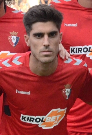 CSC_0149